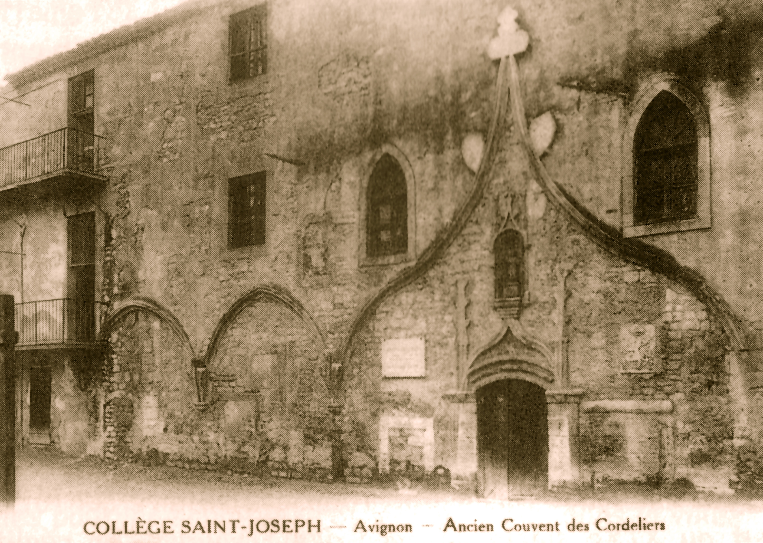 Ancien couvent des Cordeliers d'Avignon, aujourd'hui détruit dans le Collège Saint-Joseph